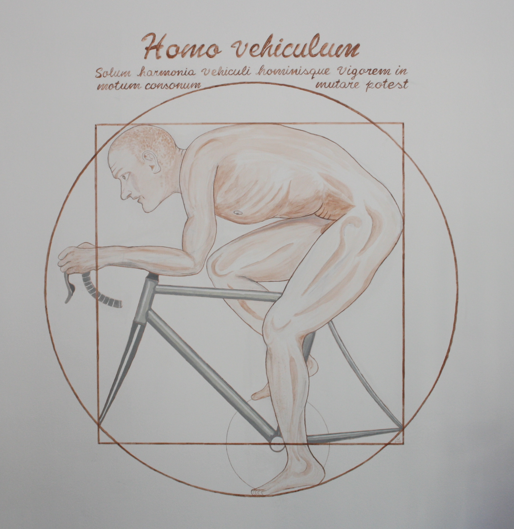 Wandmalerei in Rewel Bikes Ausstellungsraum